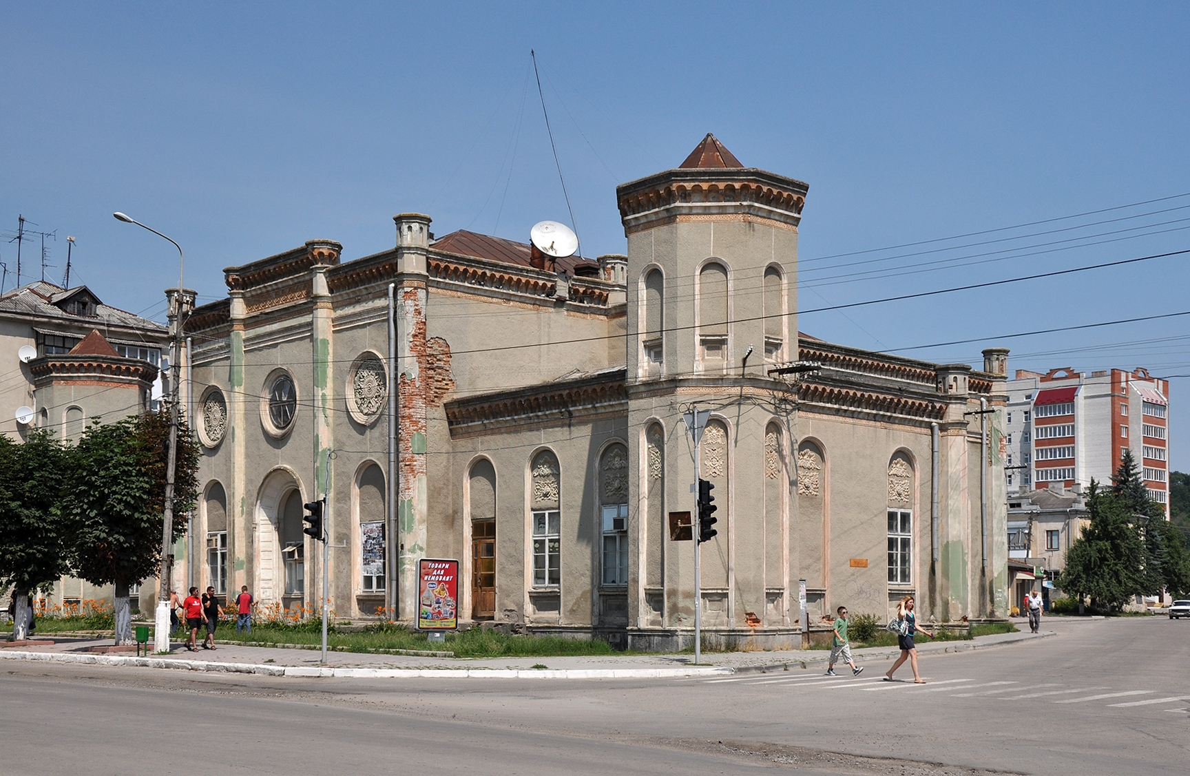 Синагога(мур.), Чортків, вул.Шевченка,33